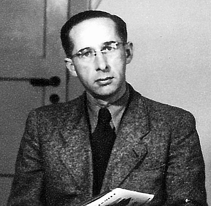 Lehrer Kurt Diedrich, 1954 im Lehrerzimmer der Anna-Siemsen-Schule in Lübeck-Eichholz, Schleswig-Holstein, Deutschland.